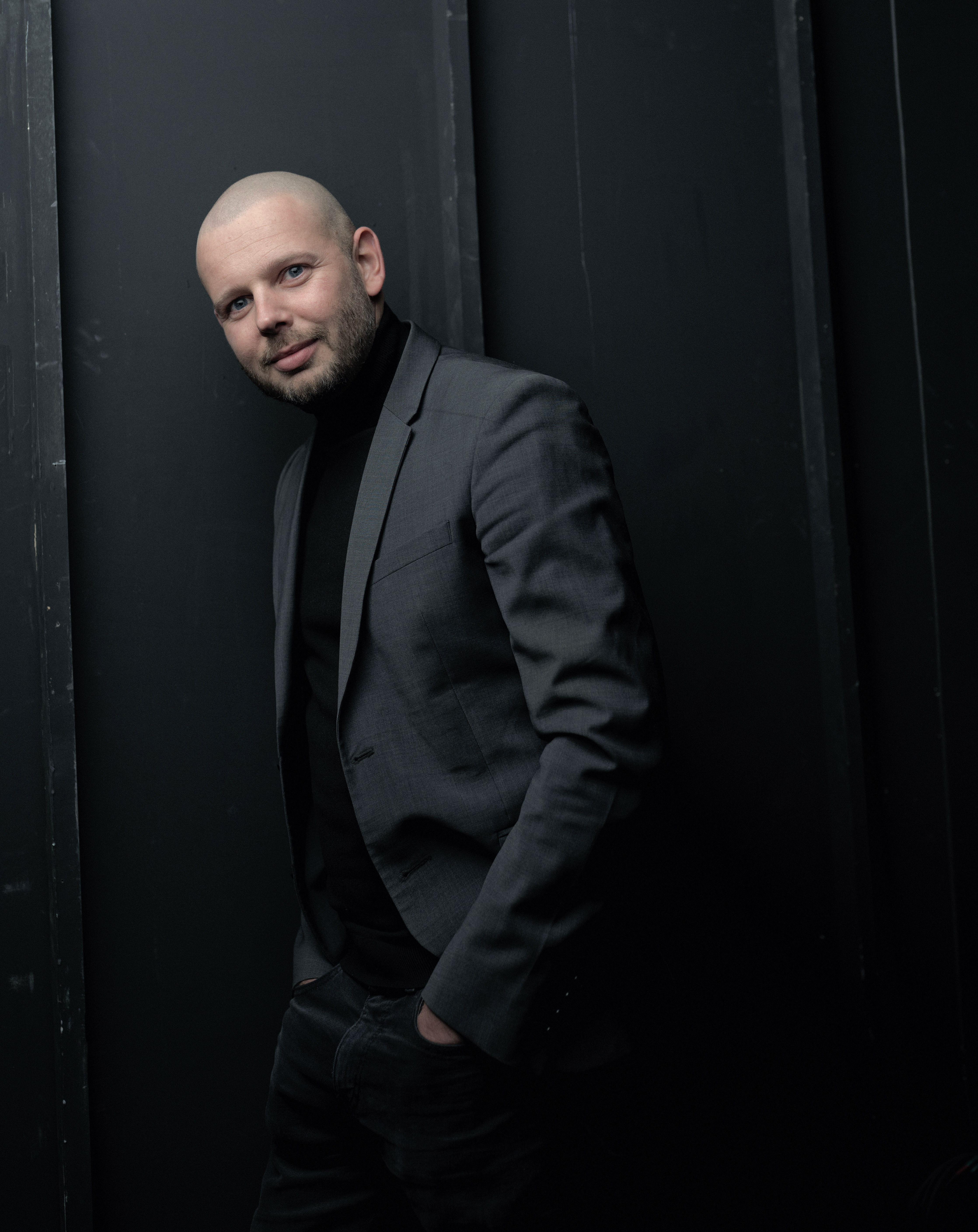 Foto: Marco Borggreve